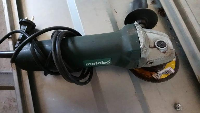 Nurklihvija